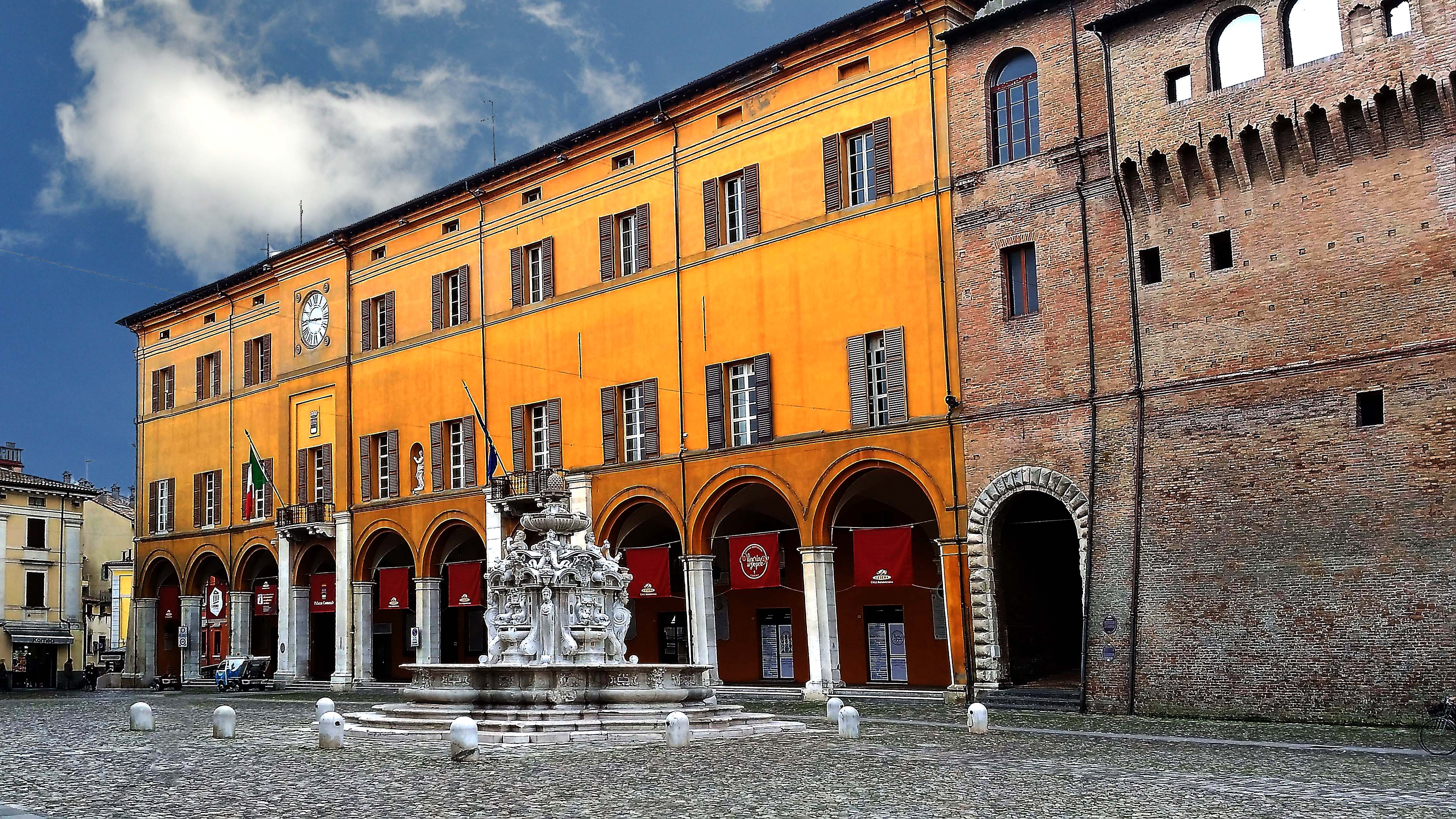 Palazzo comunale This is a photo of a monument which is part of cultural heritage of Italy.